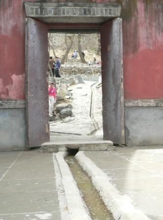 大觉寺泉水，用心阁2005年4月10日拍摄于西山大觉寺。